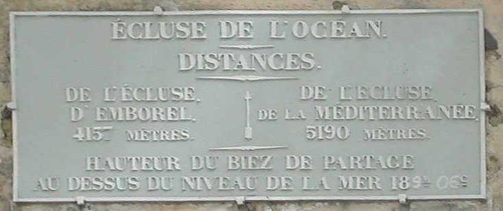 typisches Schleusenschild am Canal du Midi